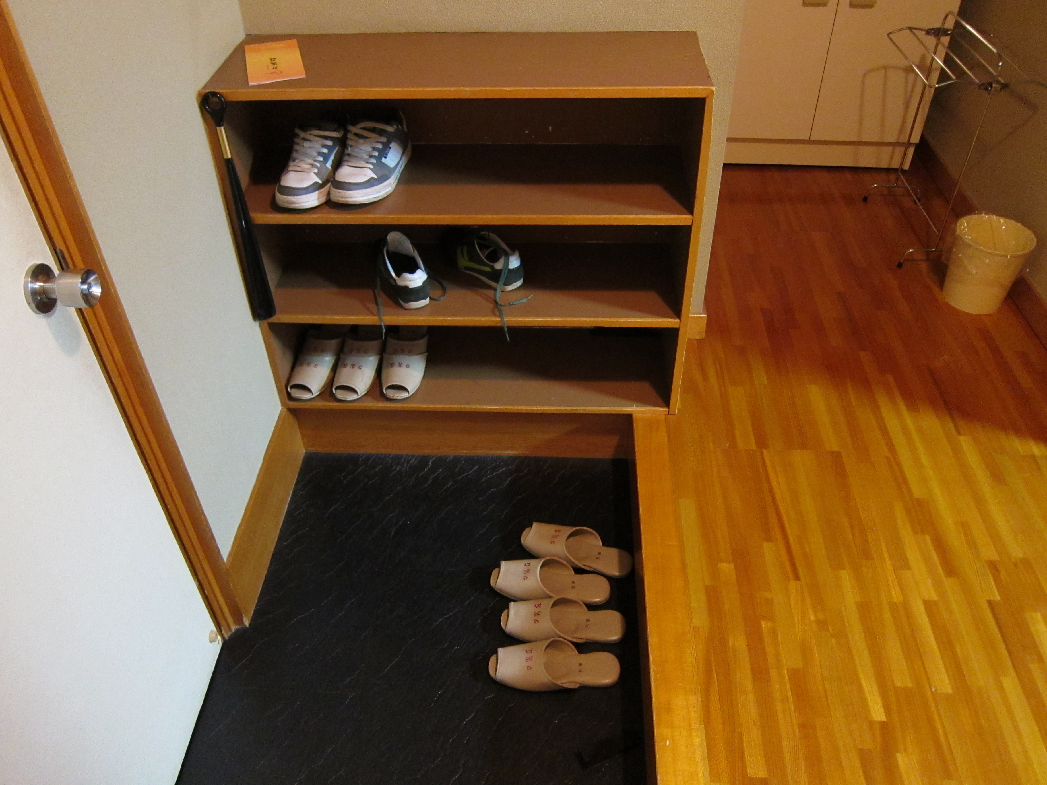 Japó 2010 - 0244